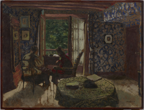 interior: Madame Vuillard and grandma Roussel at L'Étang-la-Villelabel QS:Len,"interior: Madame Vuillard and grandma Roussel at L'Étang-la-Ville" label QS:Lfr,"Intérieur : Madame Vuillard et Grand-Mère Roussel à L'Étang-la-Ville"